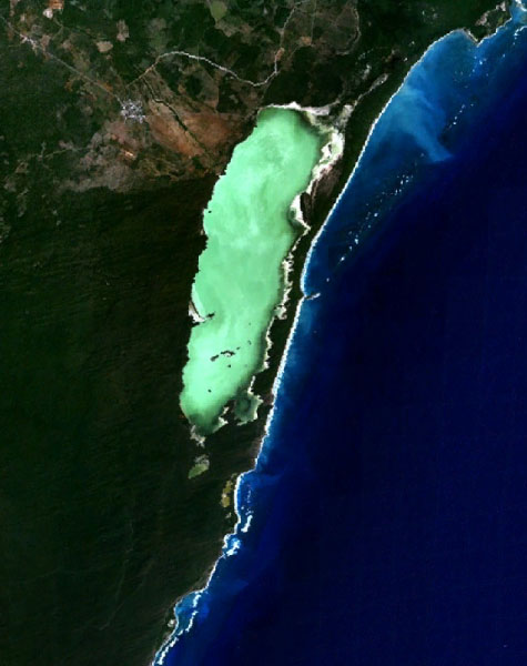 Lago de Oviedo as seen from space.